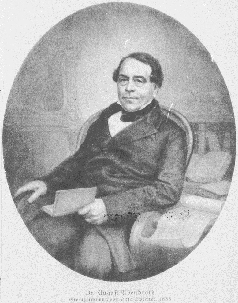 Steinzeichnung von August Abendroth